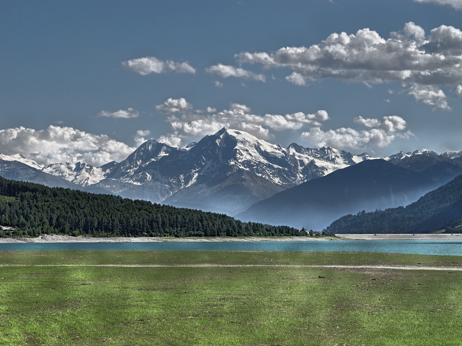 Lago di Resia